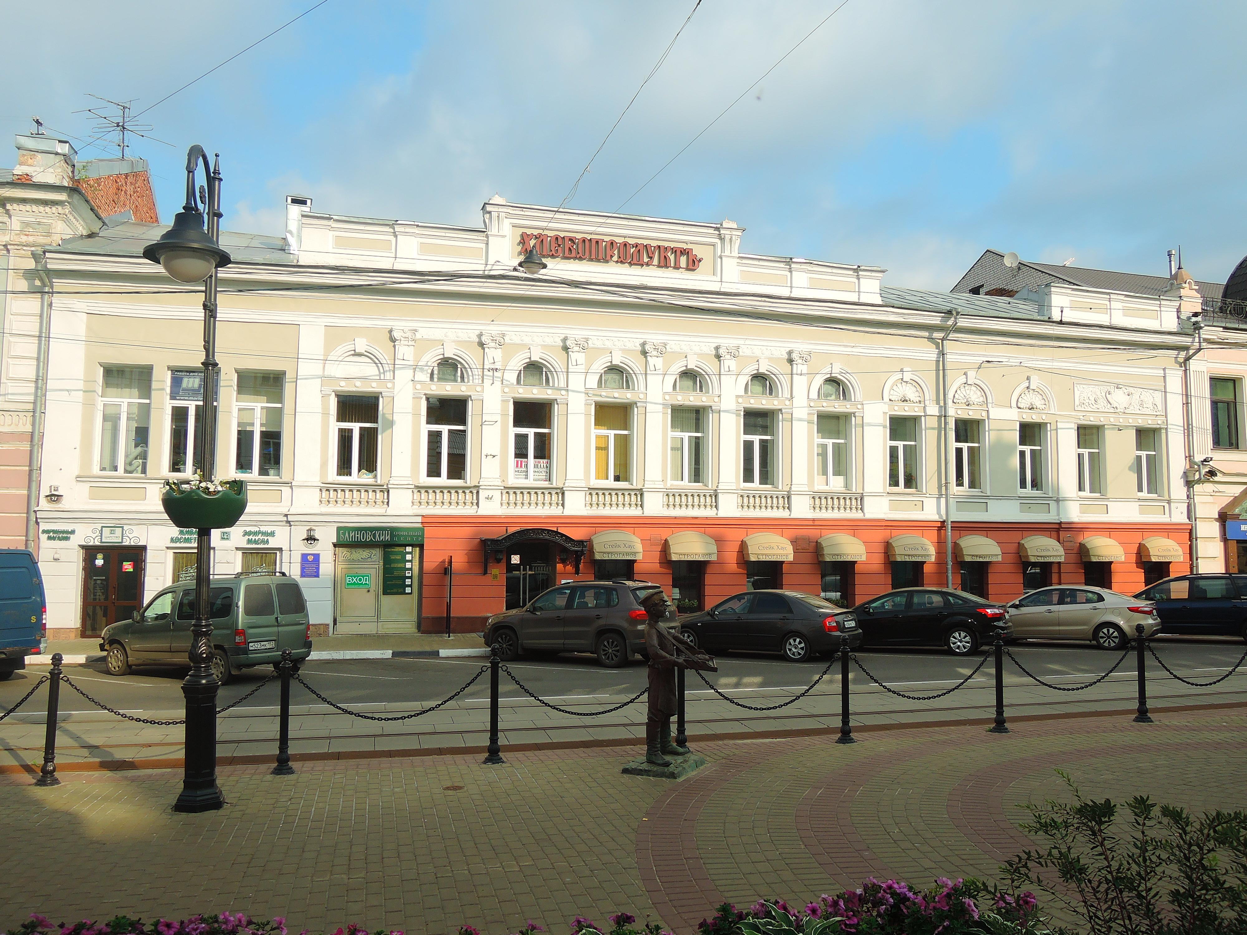 Жилой дом: улица Рождественская, 37, Нижний Новгород, Нижегородская область